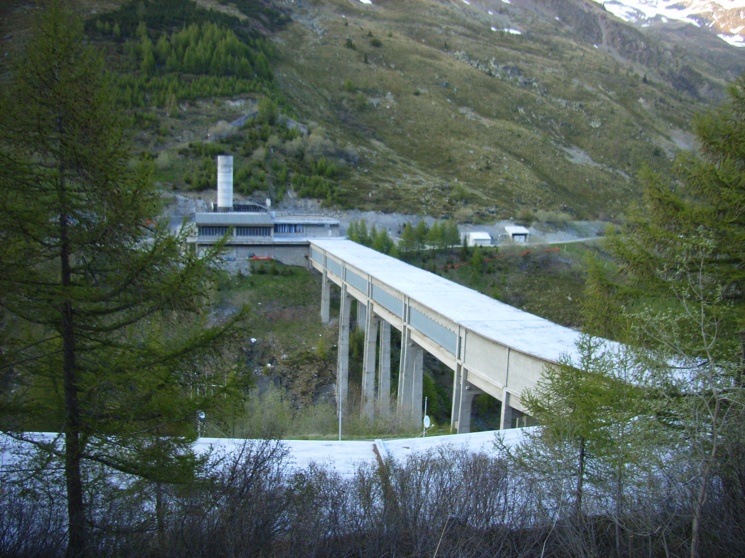 Ausfahrt des Autotunnels vom Grossen-St.-Bernard-Pass auf italienischer Seite